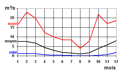 Graphique du débit mensuel de la rivière La Savoureuse dans le Territoire de Belfort. Données de base : Services de l'Eau et des Milieux Aquatiques des DIREN du bassin RMC - issues de leur site : Graphe dessiné par F5ZV le 05/03/2006